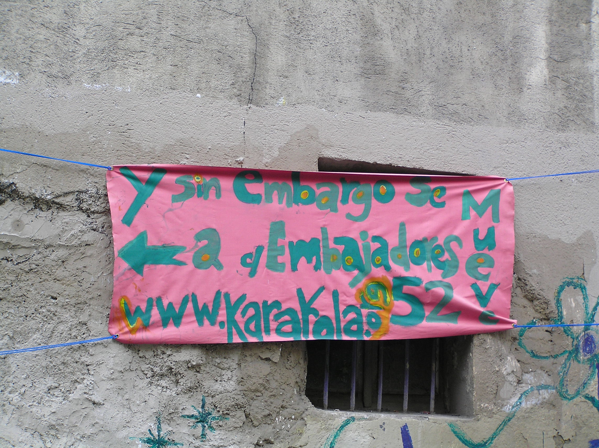 Eskalera Karakola, kasa okupada de mujeres de Madrid (España). Nota de traslado